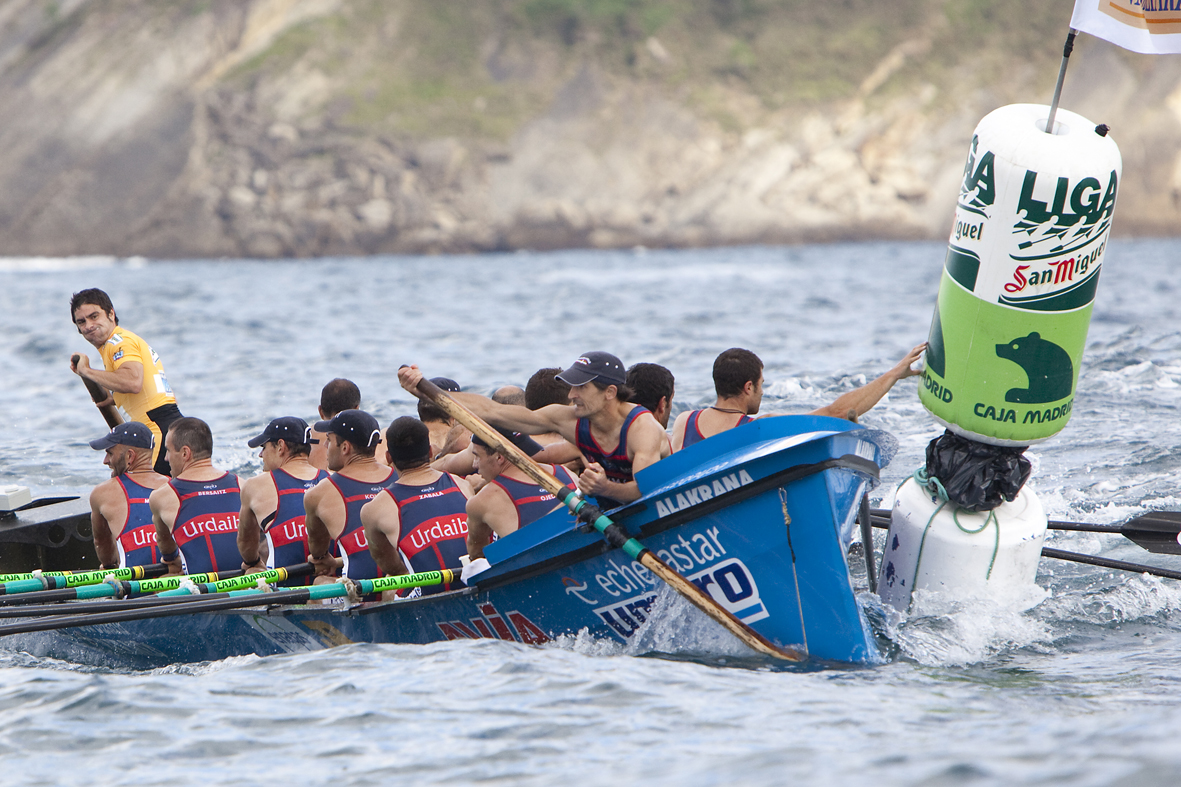 Virage de la trainière Bou Bizkaia (Urdaibai) lors d'une compétition de la Ligue San Miguel.